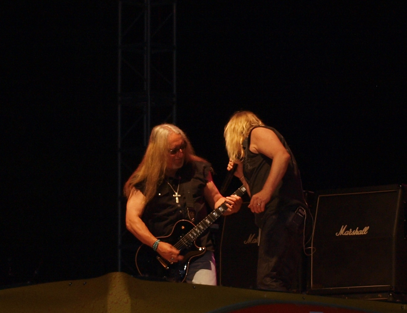 Uriah Heep na Mega Bikers susretima u Slavonskom Brodu, 9. svibnja 2009. godine.